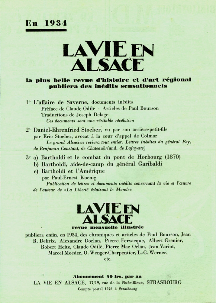 Publicité dans La Vie en Alsace, décembre 1933